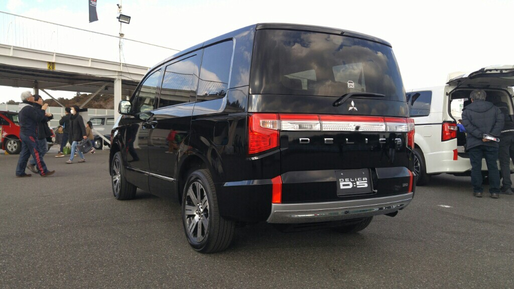 2019年撮影。